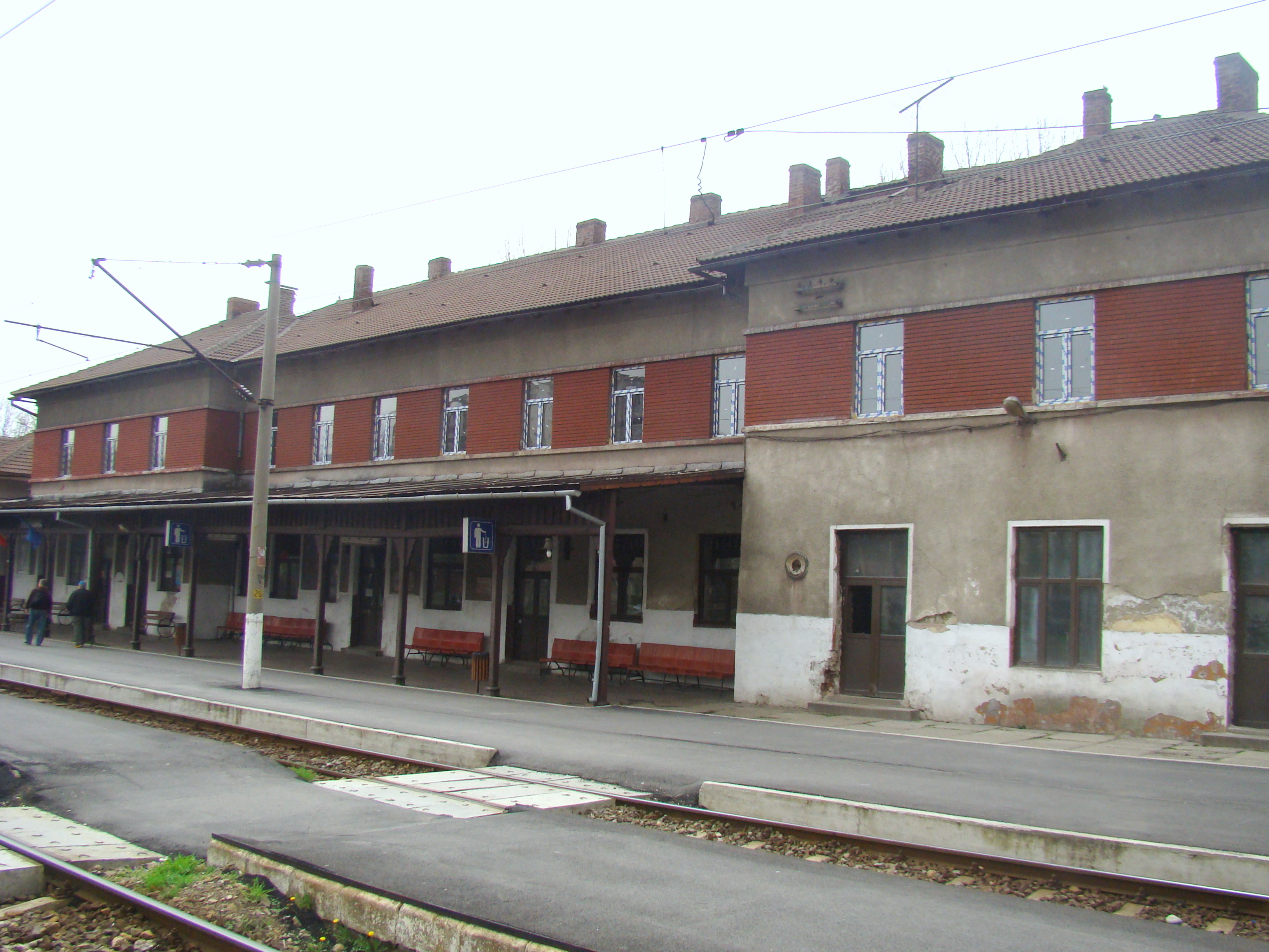 Gara din Petroşani, judeţul Hunedoara